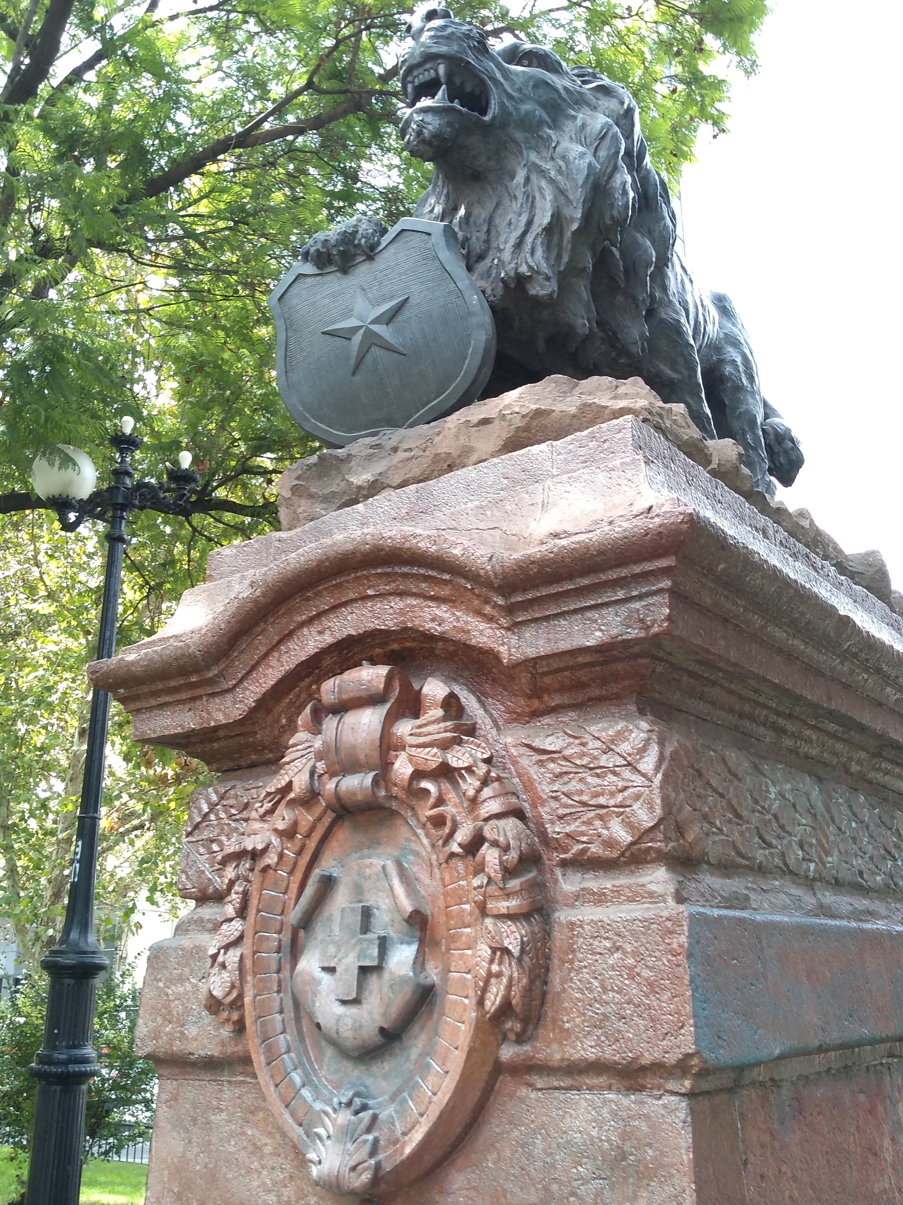 Estatua del León suizo restaurada